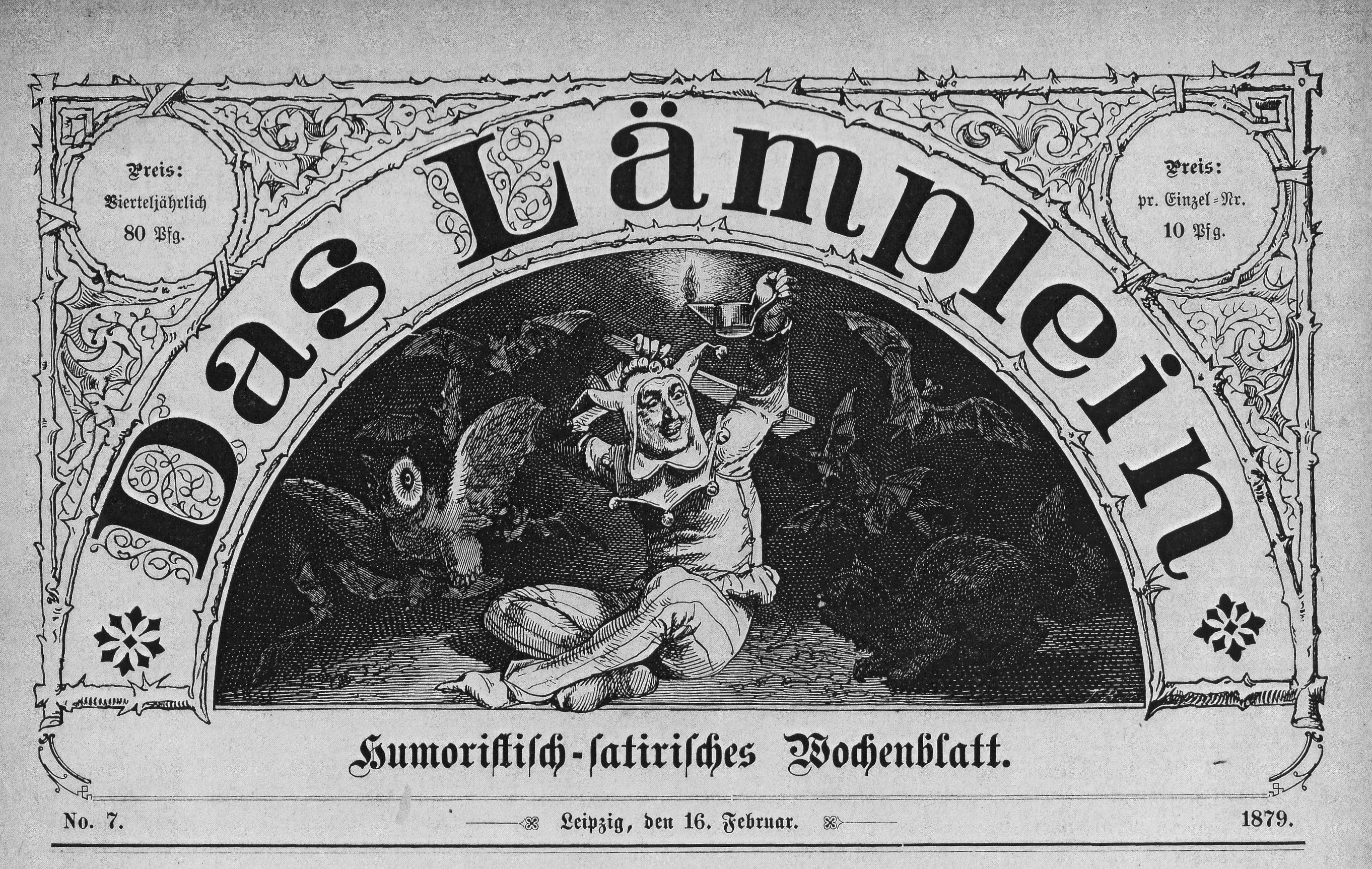 Humoristisch-satirisches Wochenblatt in Leipzig, Zeitung für die allgemeine Öffentlichkeit.